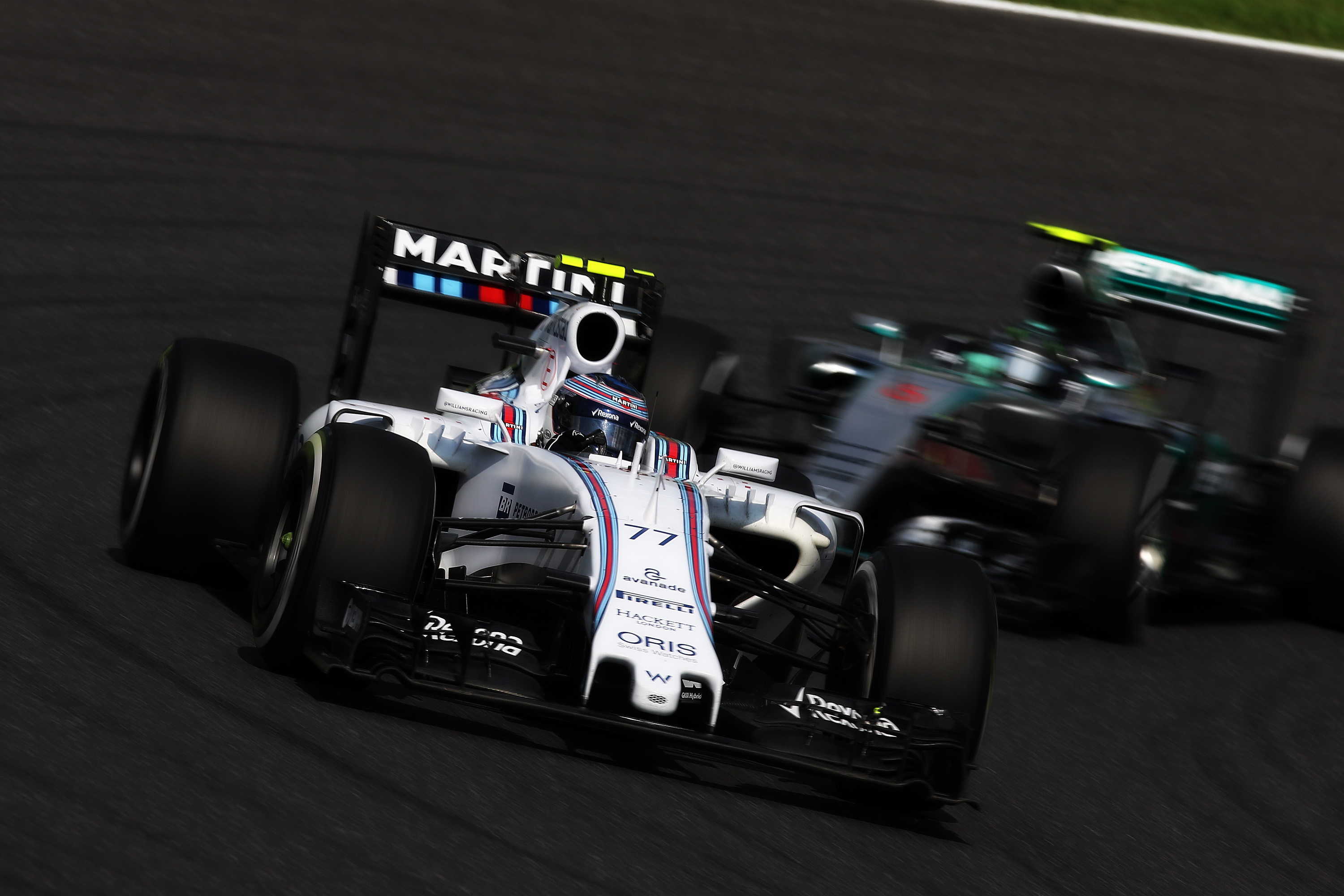 2015.9.27 F1 Rd.14 Suzuka Final Williams Martini Racing (FW37) 77 バルテリ・ボッタス（vs #6 ニコ・ロズベルグ） [7D2_8216ks]